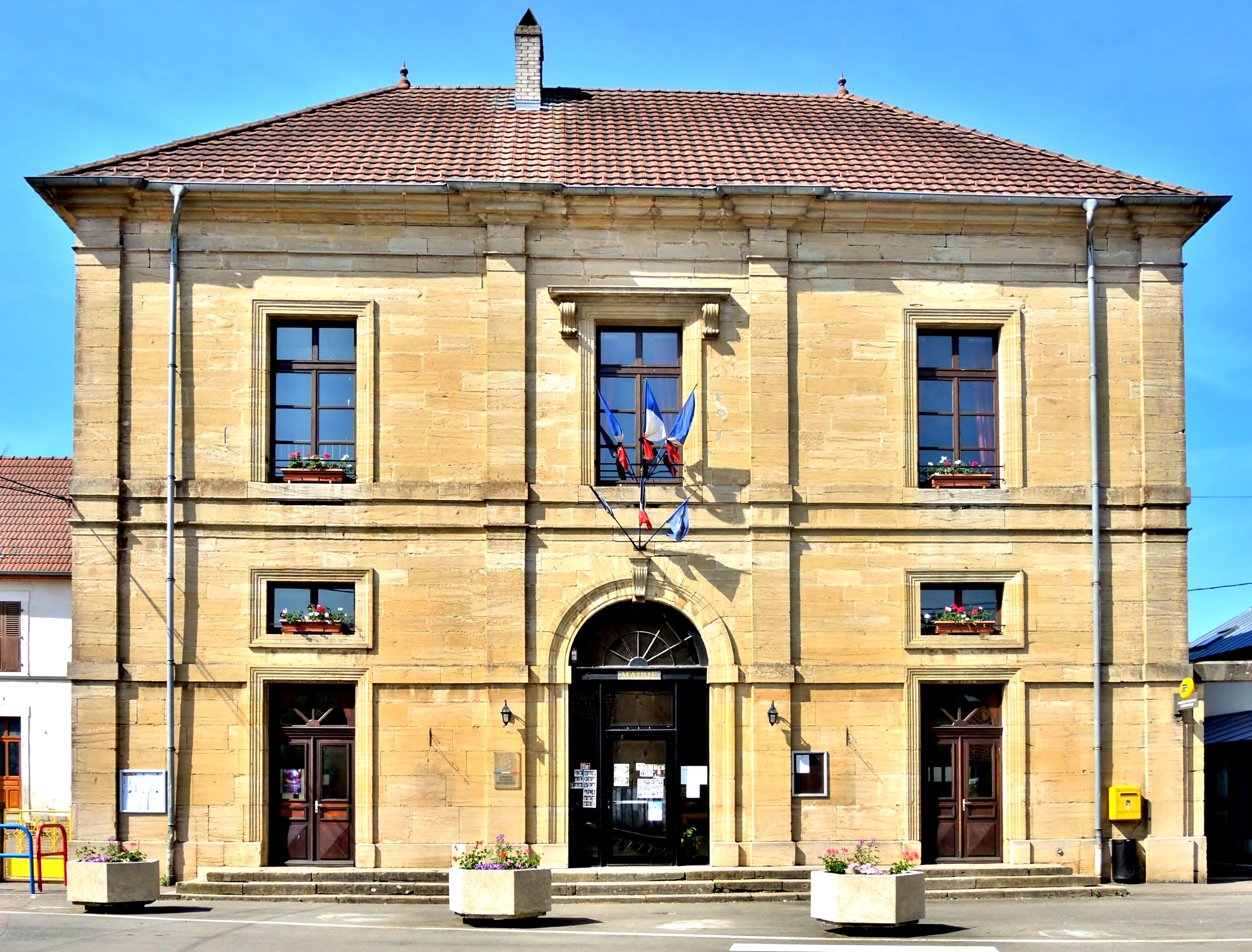 Façade de la mairie de Mailley-et-Chazelot. Haute-Saône